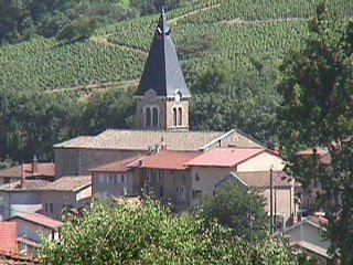 Vue du bourg de Marchampt en juin 2010